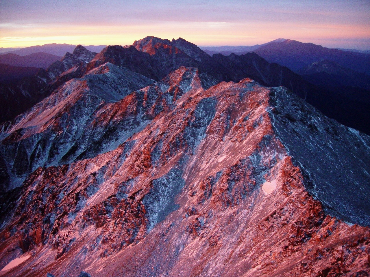 Mount Ōbami from Mount Yari